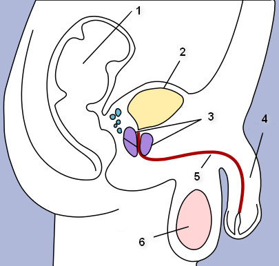 Мочеполовая система человека.